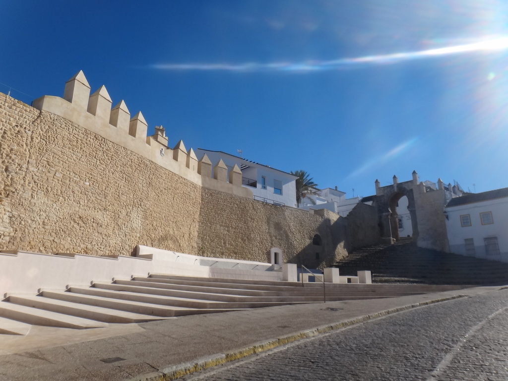 Medina Sidonia (Andalucía, España)